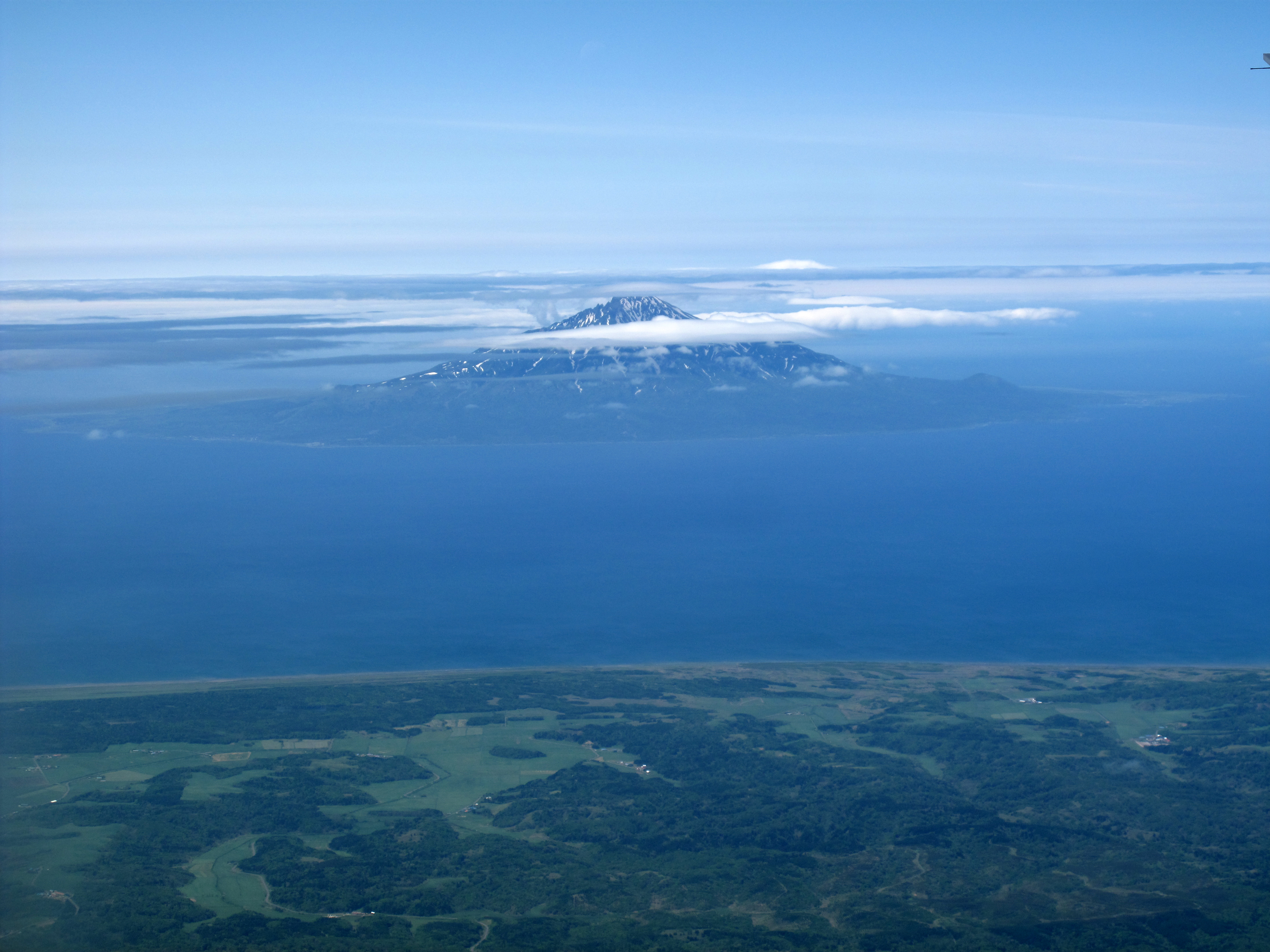 利尻島全景（航空機より）